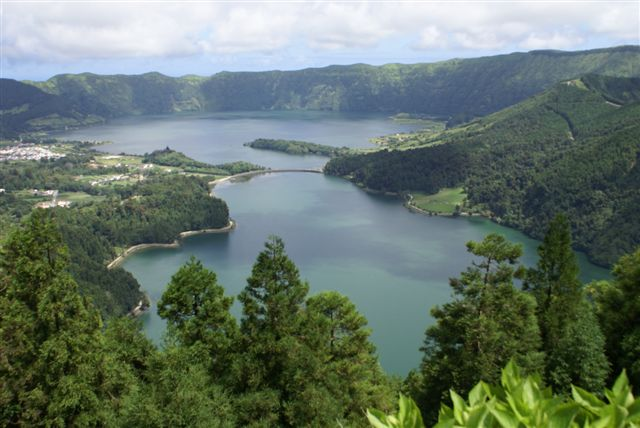 Lagoa das Sete Cidades, Miradouro da Vista do Rei, Ilha de São Miguel, Açores, Portugal